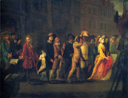 Départ des comédiens